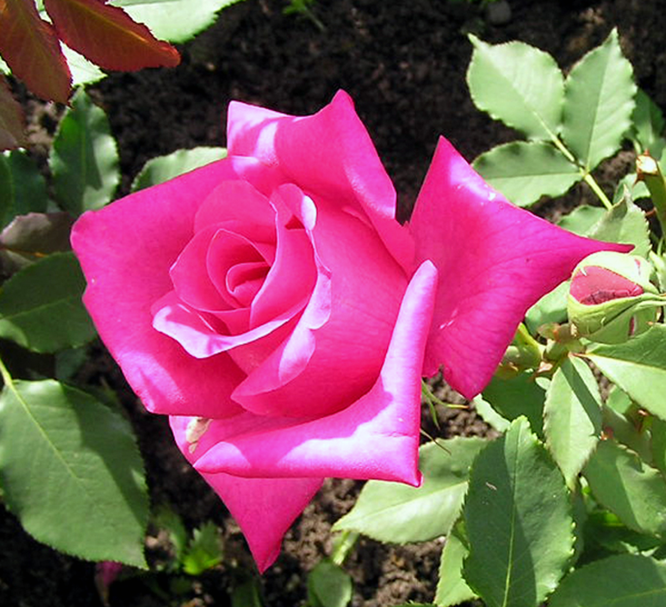 Description: Rose 'Peter Frankenfeld' Source: Eigene Fotografie Date: 25. Juli 2005 Author: Schubbay